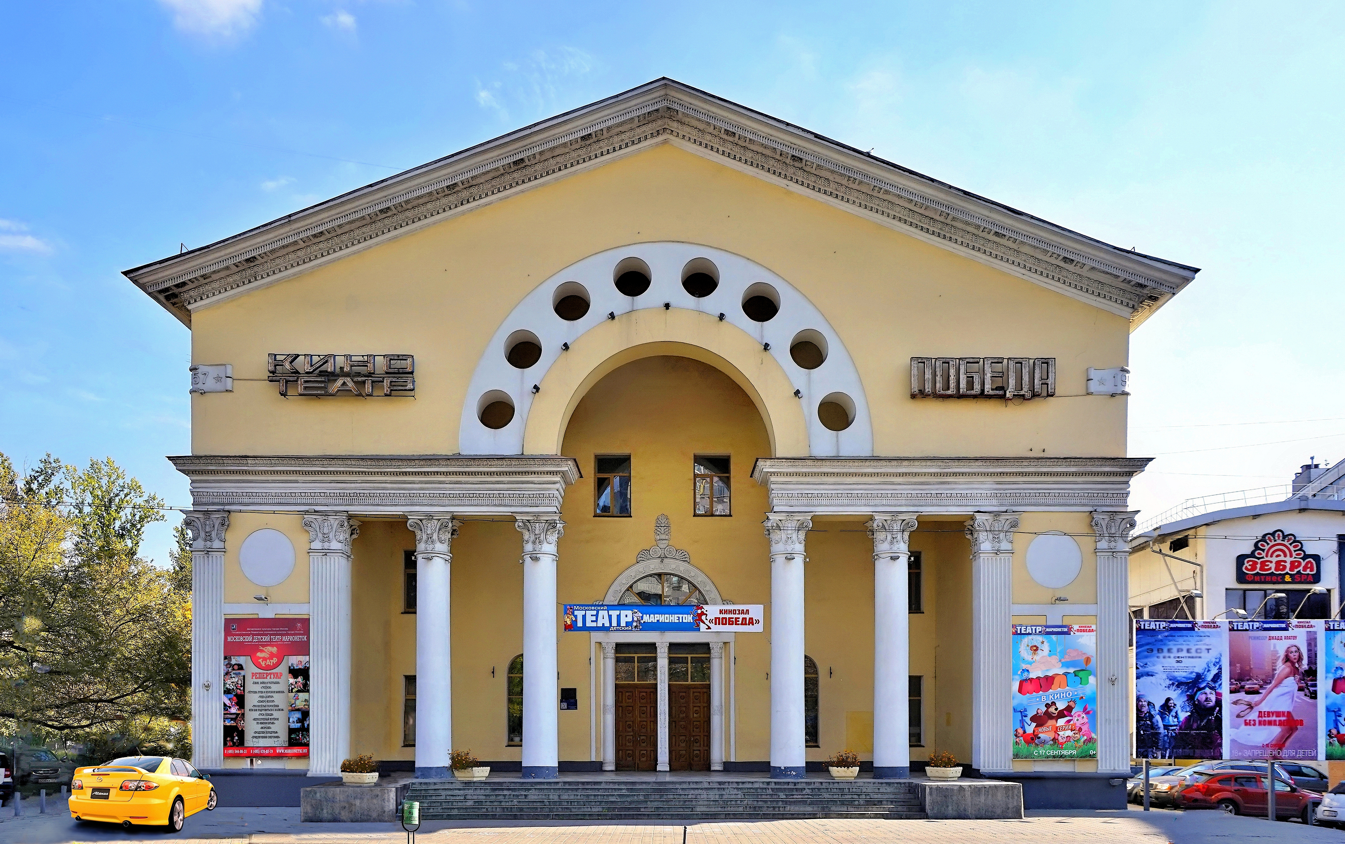 Кинотеатр Победа: Абельмановская ул., дом 17А, Таганский, Центральный округ, Москва